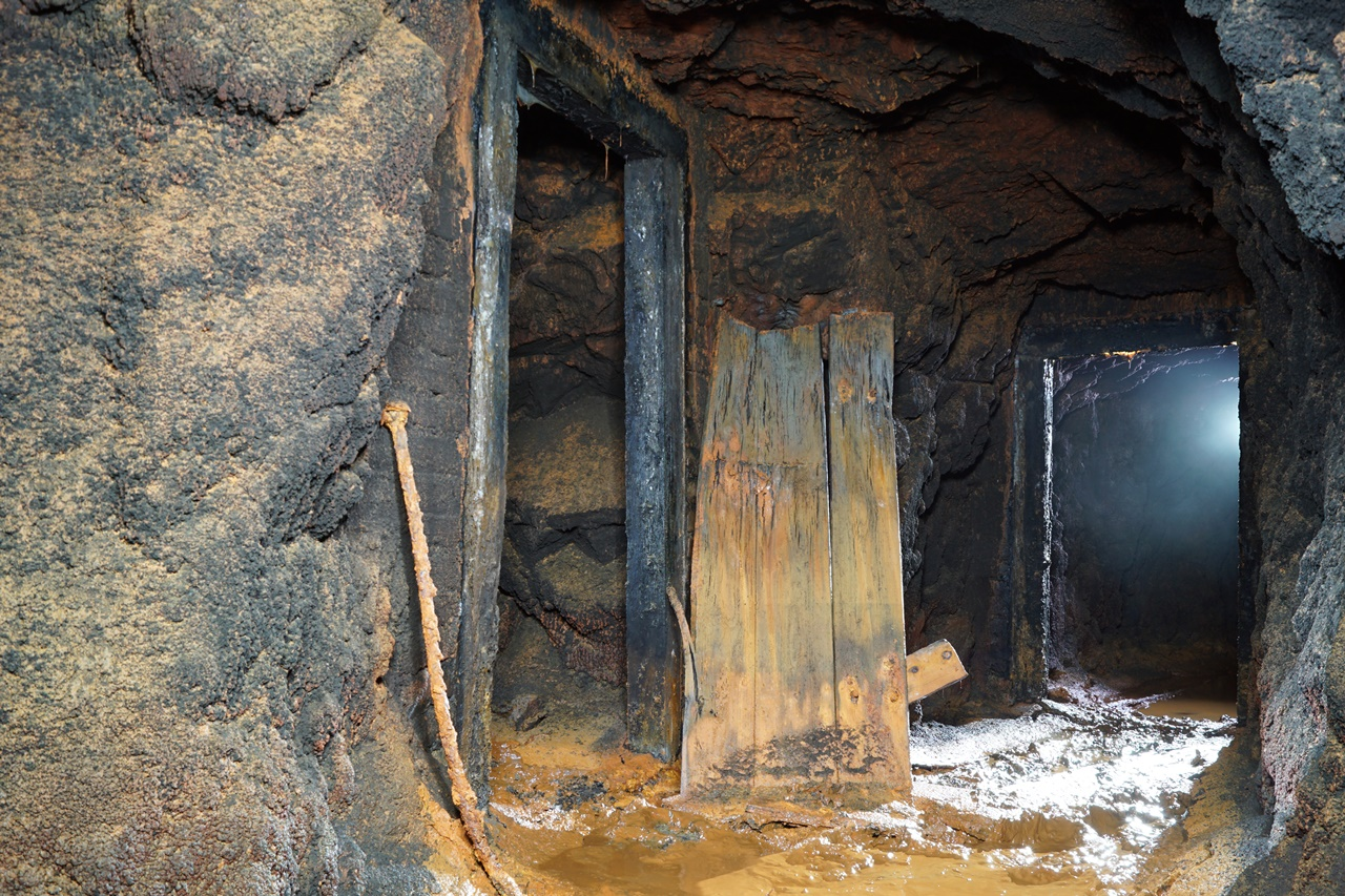 Sprengstofflager